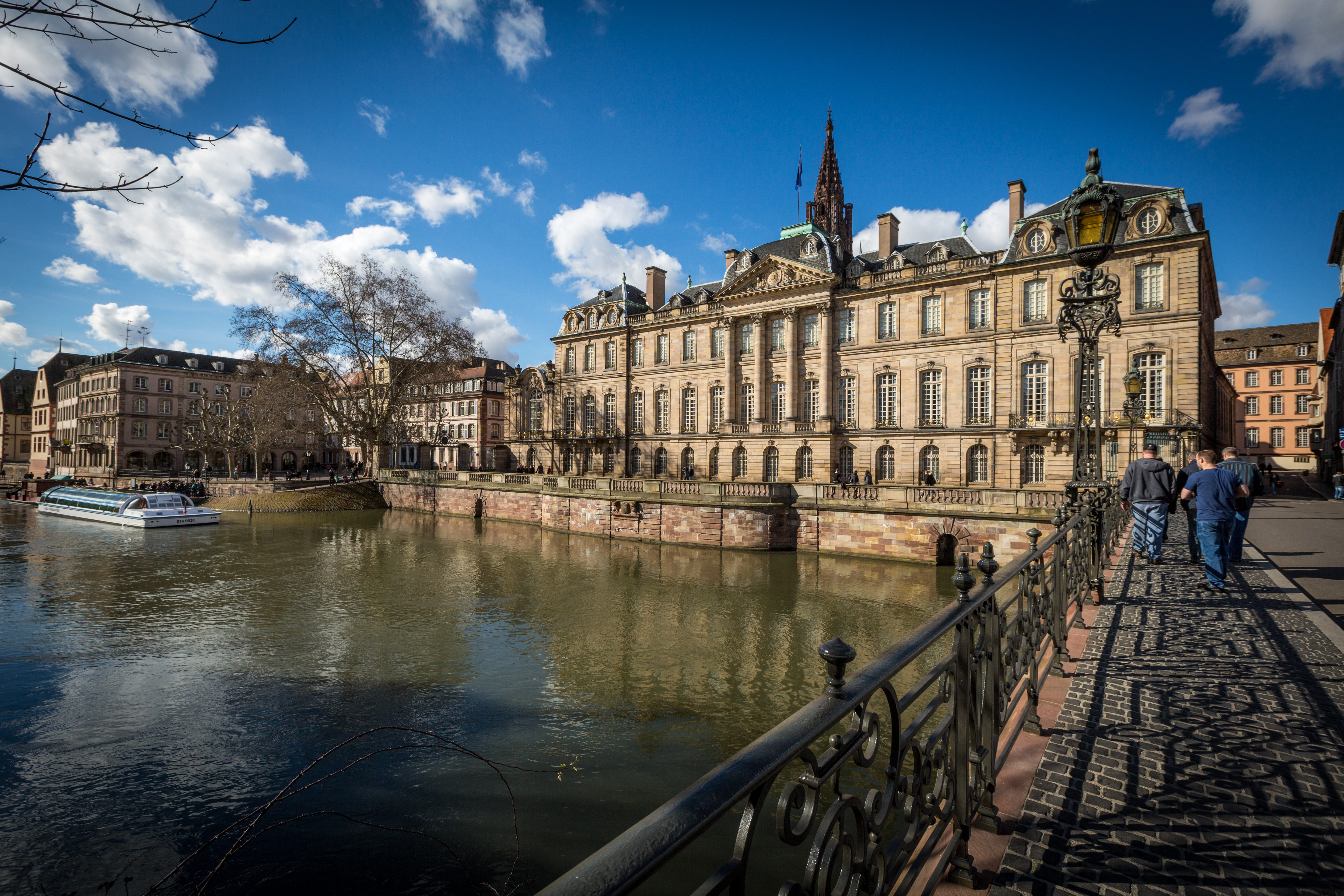 Strasbourg Palais Rohan février 2014